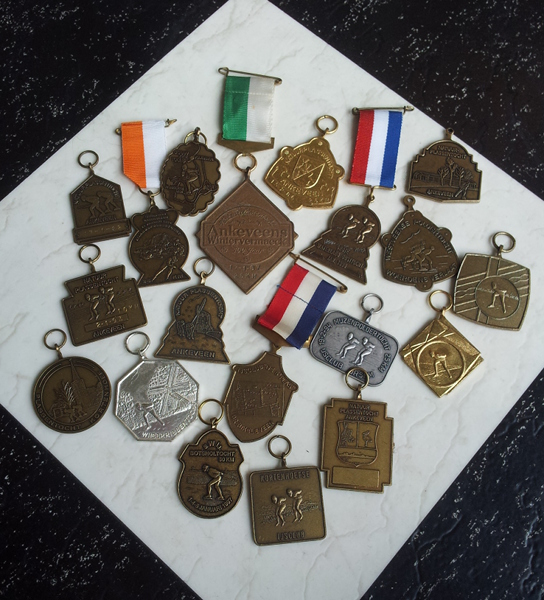 Medailles zoals uitgereikt na het voltooien van een toertocht.